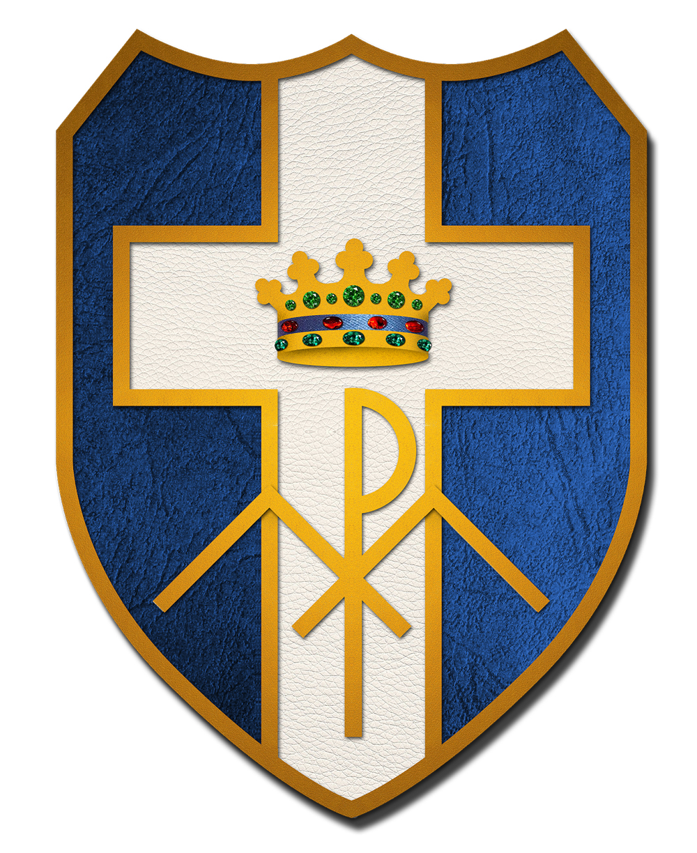 Brasão utilizado antes da adesão do Brasão atual proveniente da Prima-Primária